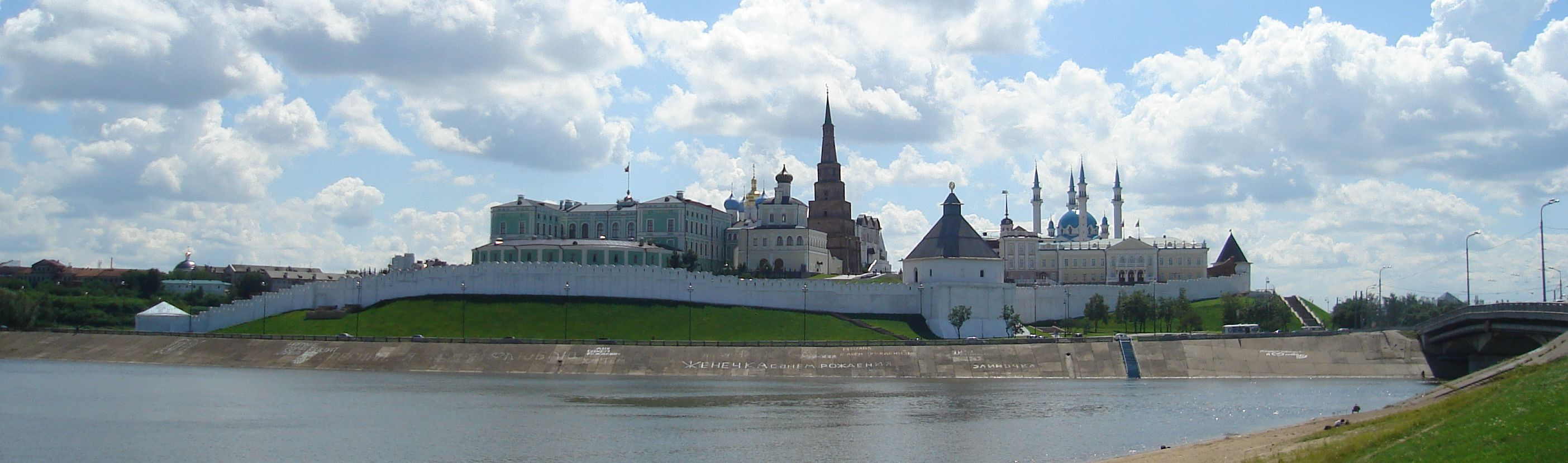 Söyembikä Tower